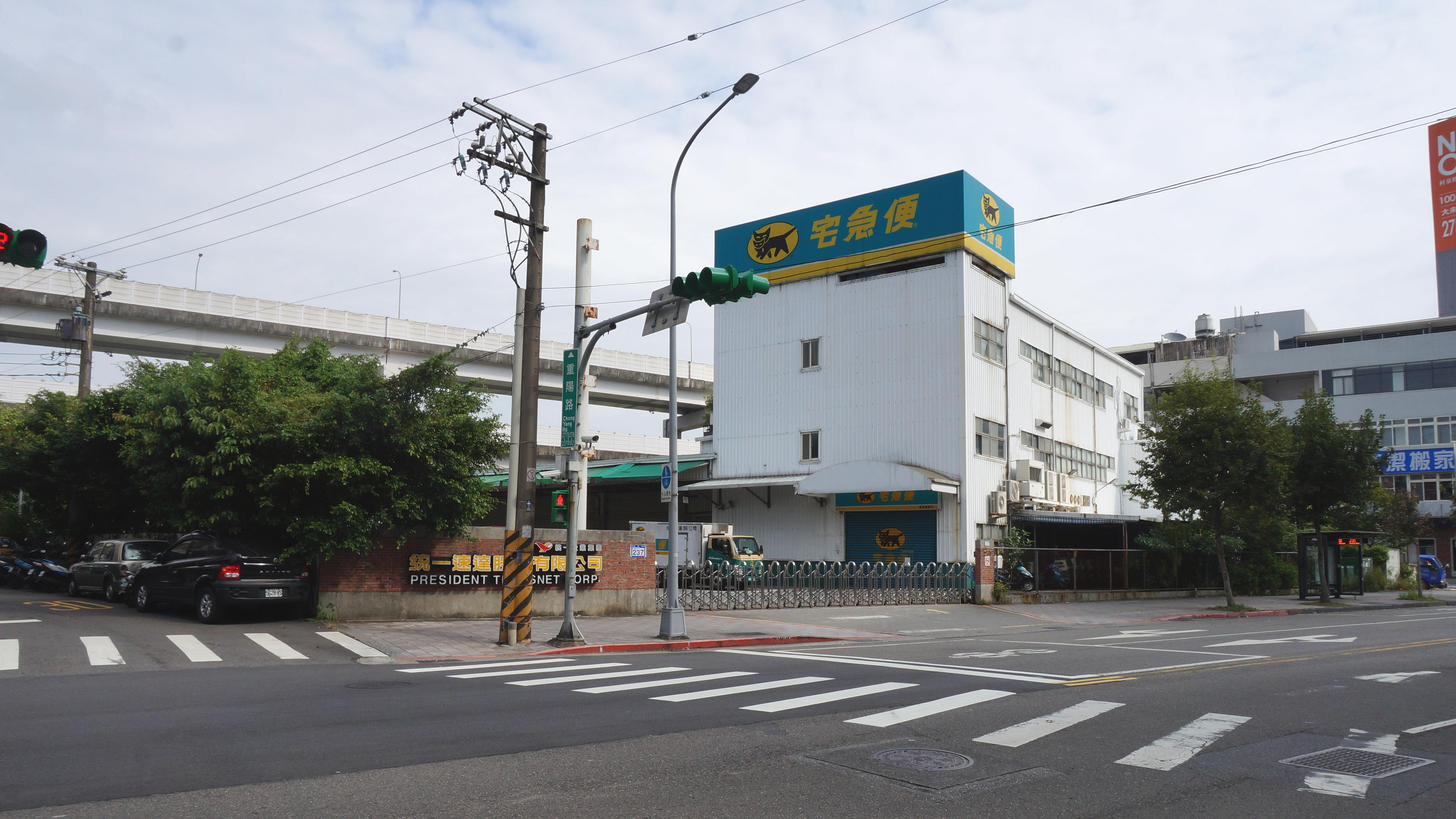 中文（台灣）: 統一速達南港營業所，地址：臺北市南港區重陽路237號。